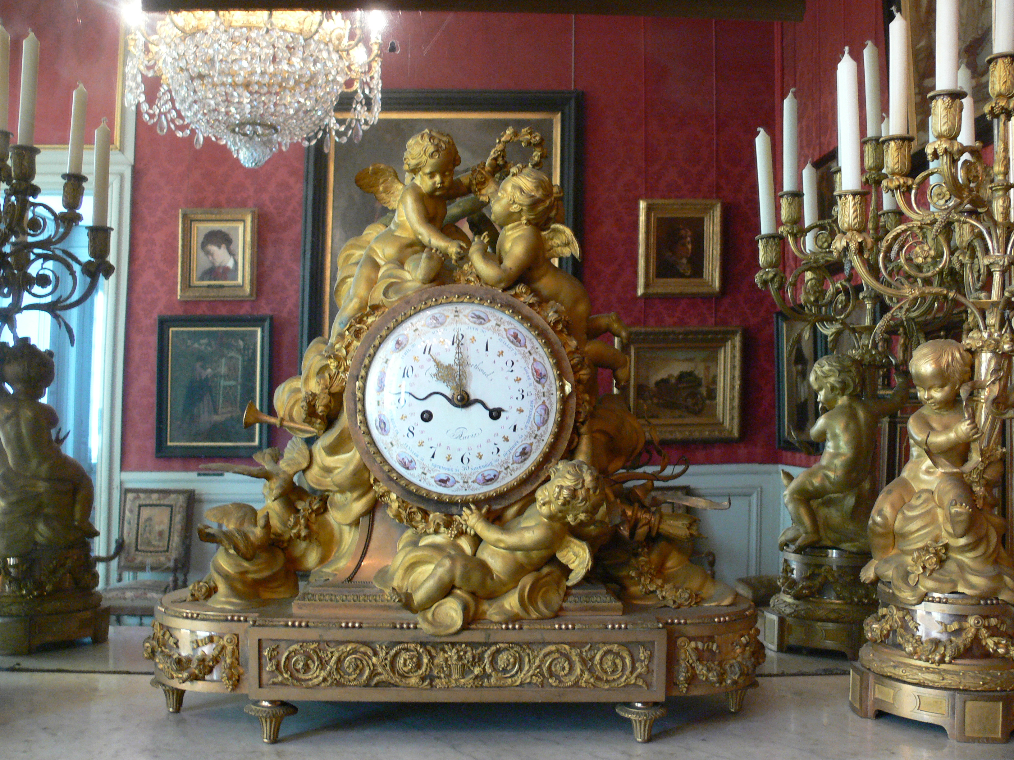 Compiègne, France: Château de Compiègne; Musée du Second Empire: Horloge